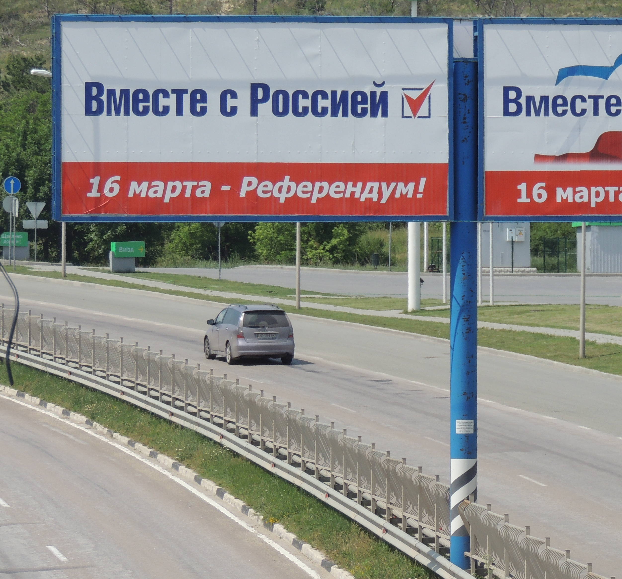 агитационный билборд в Симферополе